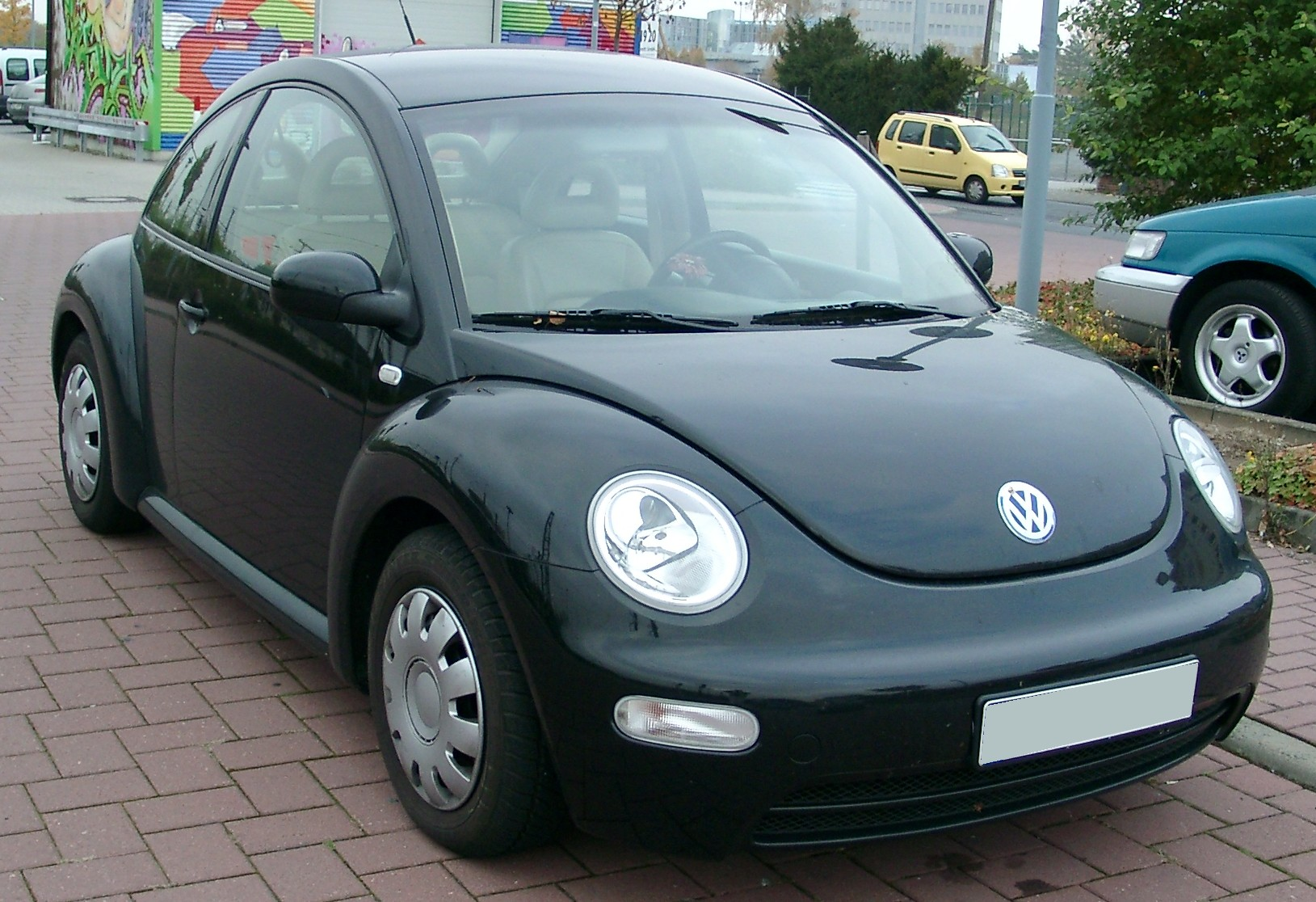 VW New Beetle